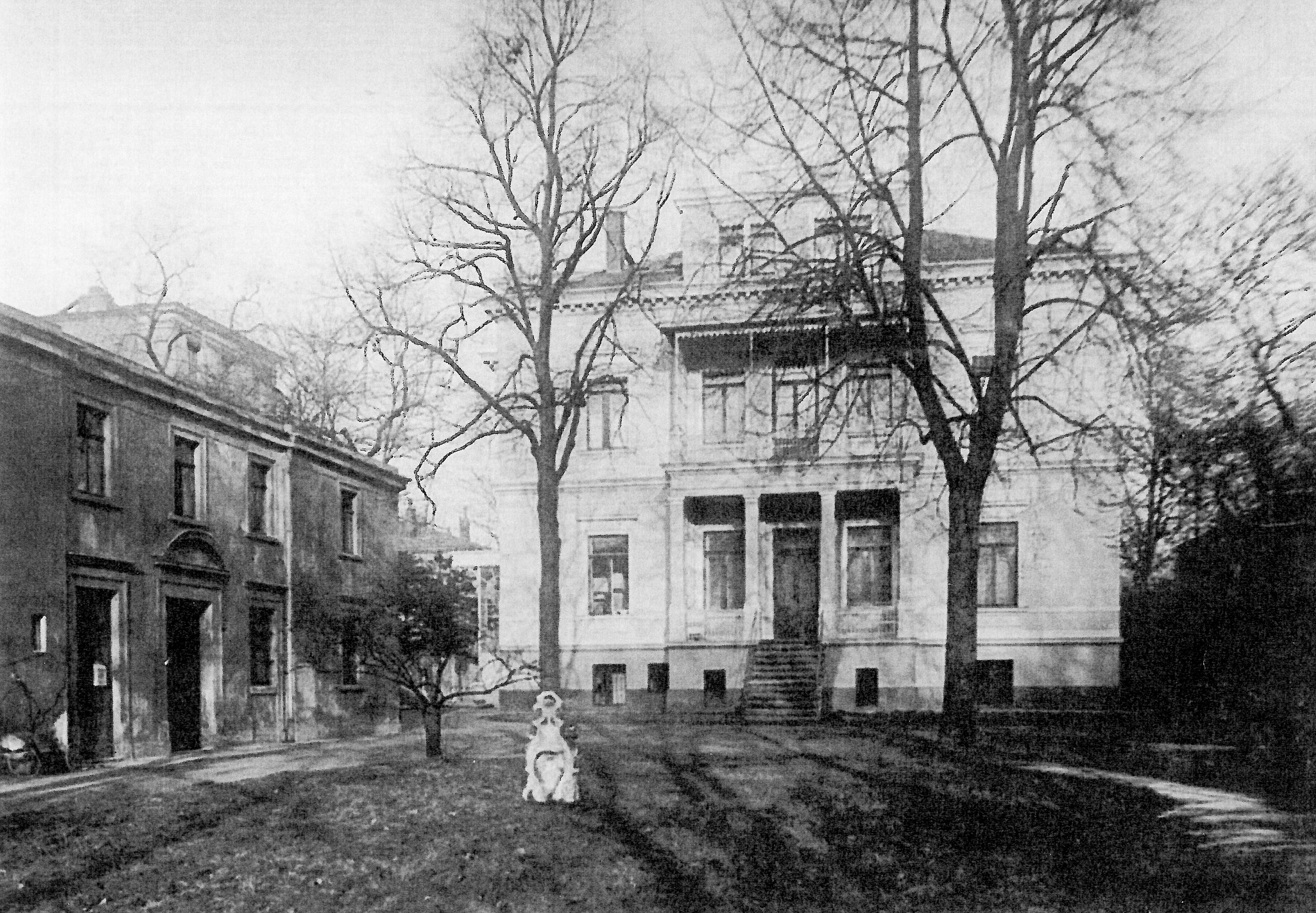 Wiener Straße 36 Hofseite, um 1939